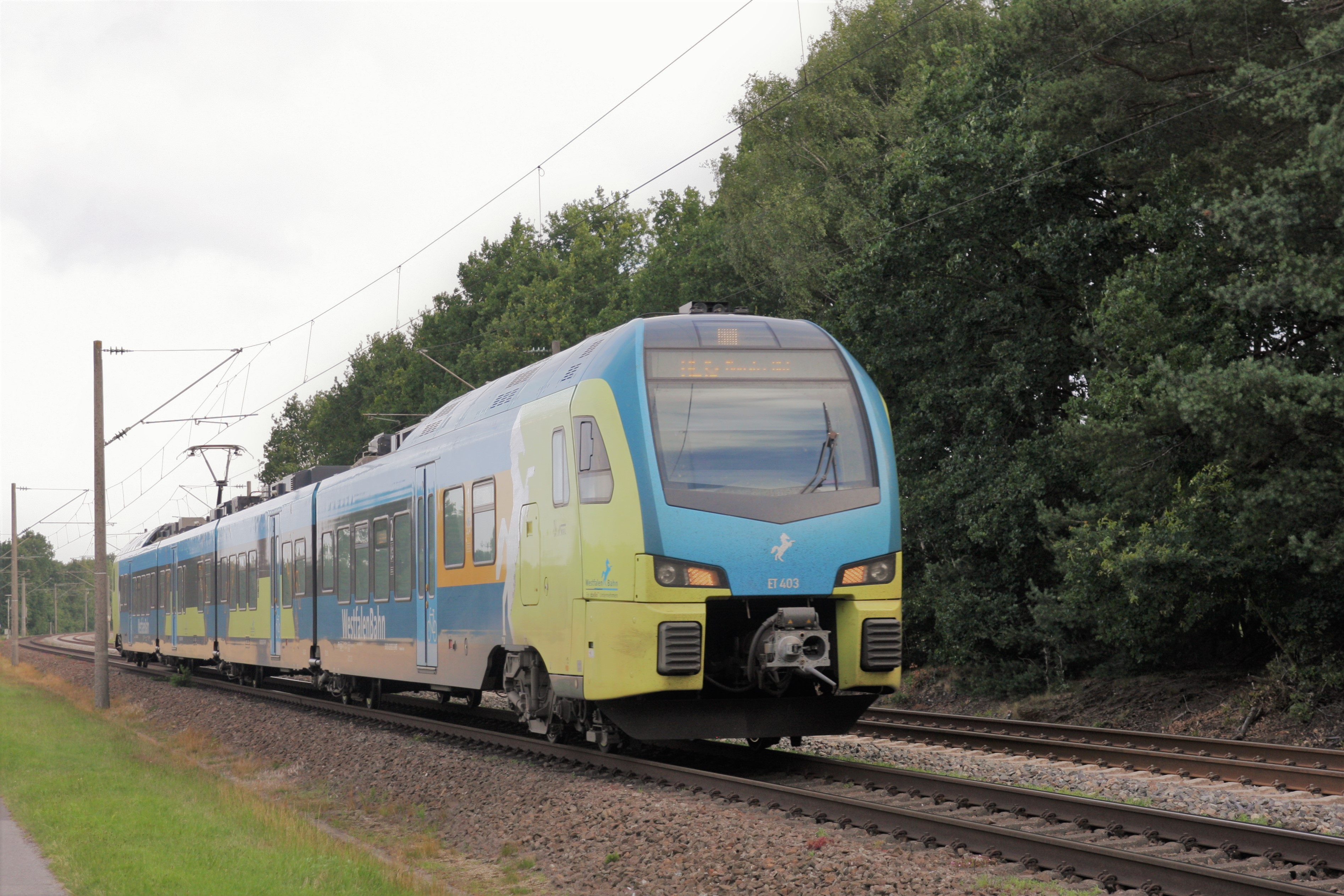 Ein Flirt 3 der Westfalenbahn fährt als RE 15 durch Emsbüren.